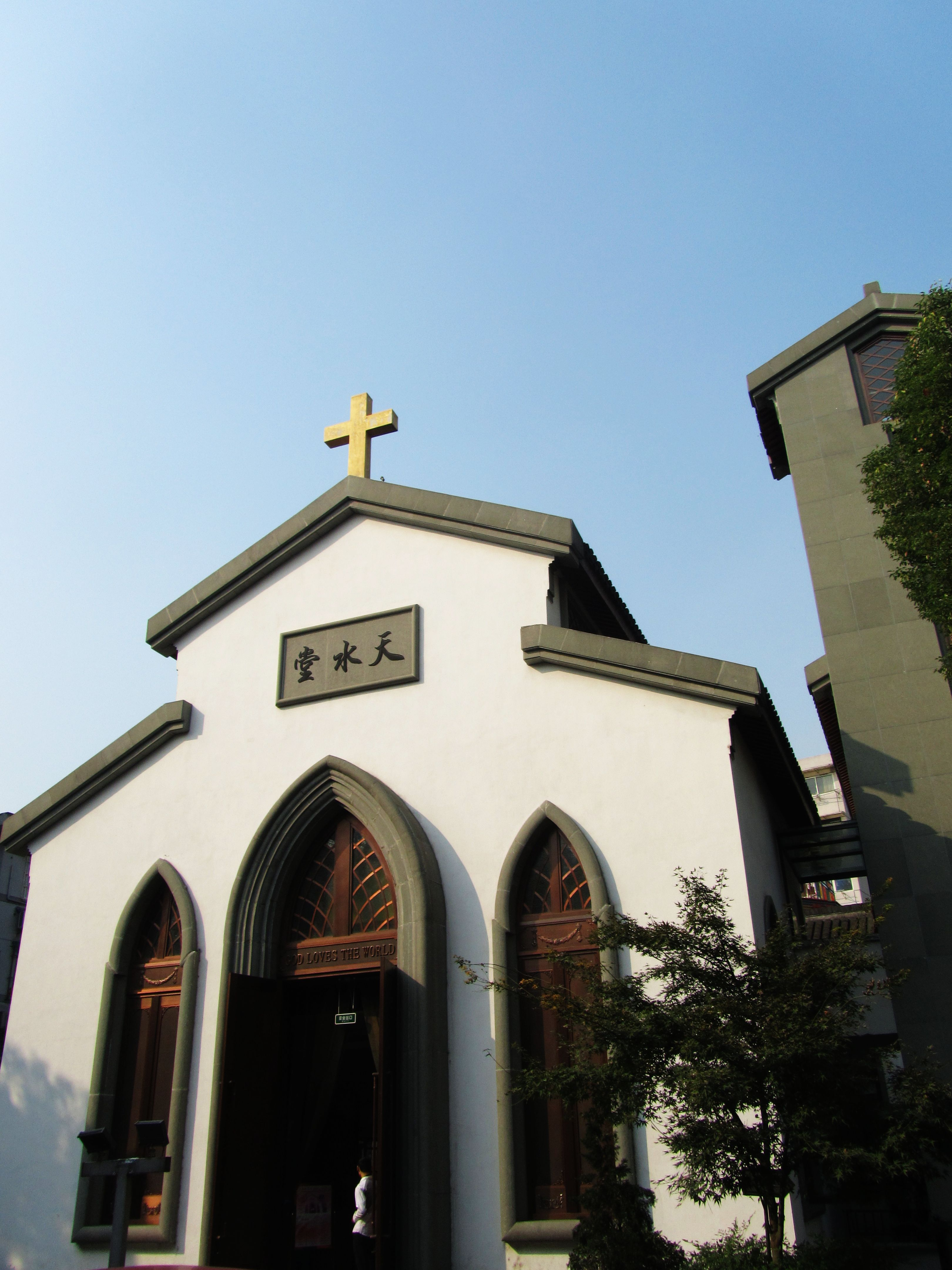 杭州耶稣堂弄天水堂。